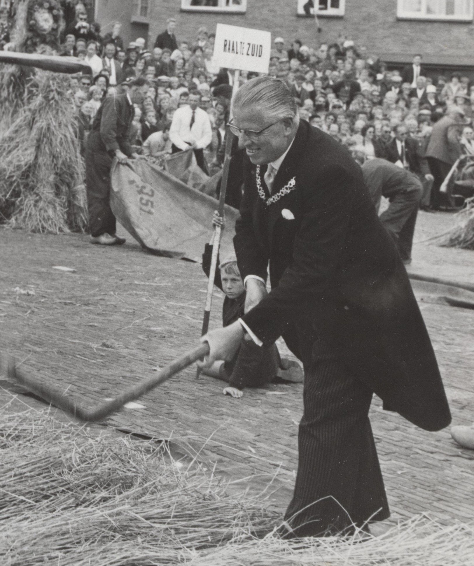 Collectie / Archief : Fotocollectie Elsevier Reportage / Serie : [ onbekend ] Beschrijving : oogsten, festiviteiten, wedstrijden, granen, burgemeesters, Ganzeboom A.J. Datum : 20 augustus 1964 Locatie : Raalte Trefwoorden : burgemeesters, festiviteiten, granen, oogsten, wedstrijden Persoonsnaam : Ganzeboom A.J. Instellingsnaam : Stöppelhaene Fotograaf : Nijs, Jac. de / Anefo Auteursrechthebbende : Nationaal Archief Materiaalsoort : Foto (zwart/wit) Nummer archiefinventaris : bekijk toegang 2.24.05.02 Bestanddeelnummer : 072-0688